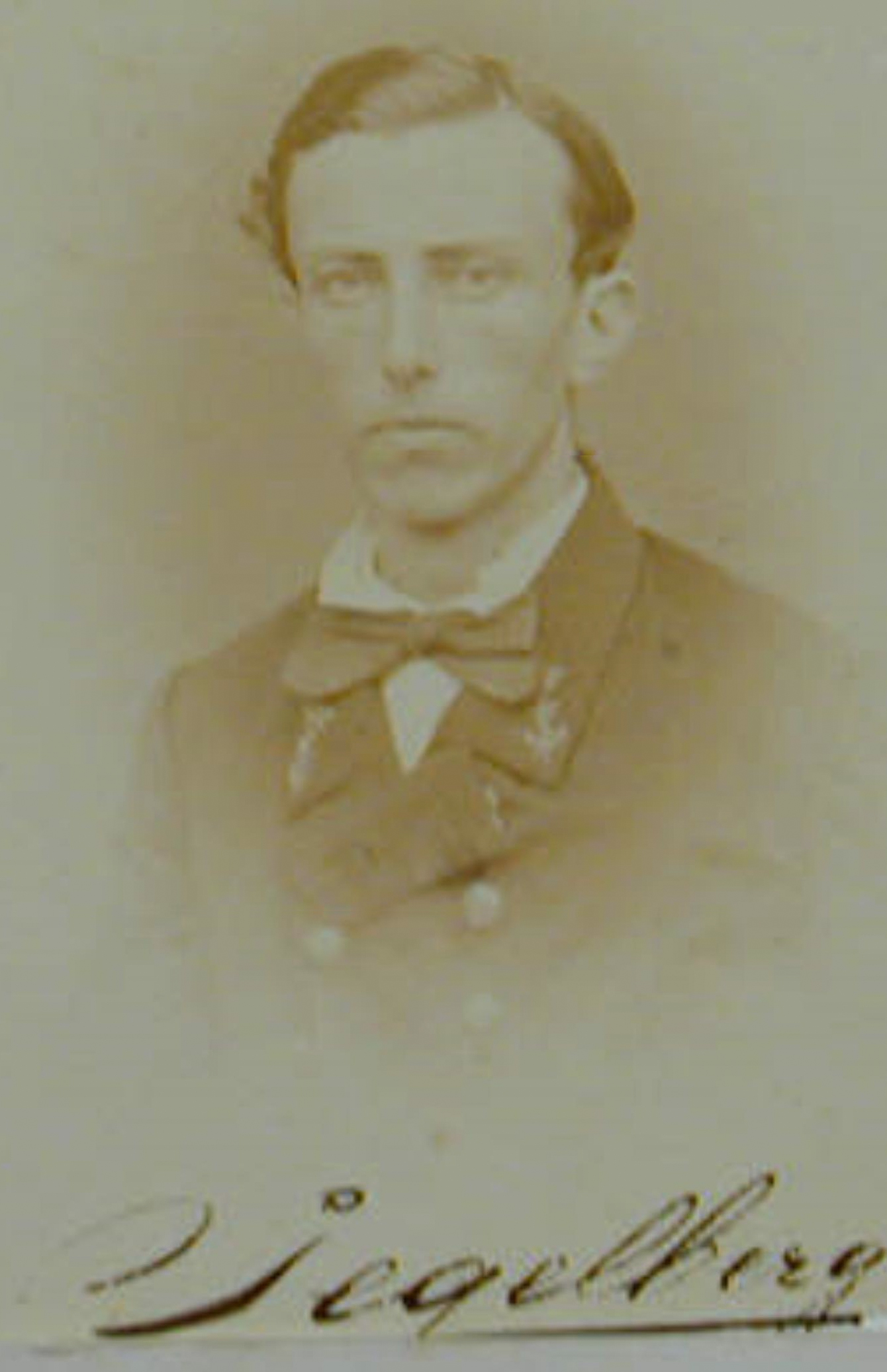 Portret van de luitenant ter zee tweede klasse Peter Emelius Tegelberg in 1864